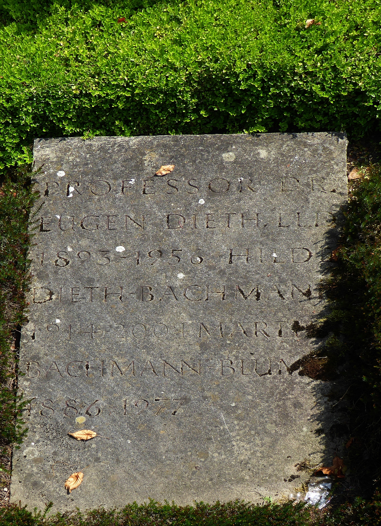 Eugen Dieth (1893–1956) Anglist, Dialektologe, «Dieth-Schrift», Grab auf dem Friedhof Witikon, Zürich